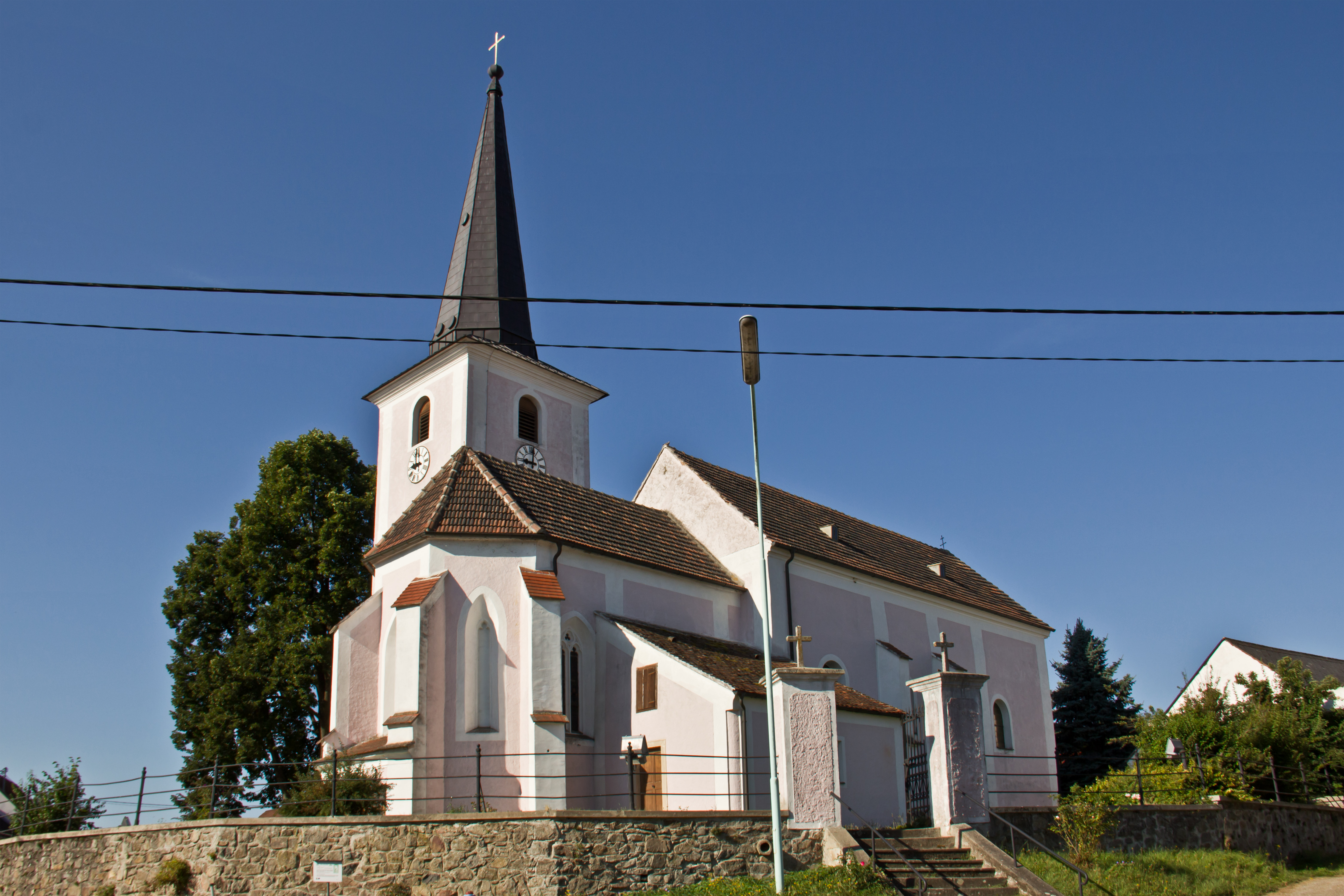 Die Pfarrkirche von Speisendorf ist dem Heiligen Nikolaus geweiht. Die im Kern romanische, barockisierte Saalkirche mit gotischem Chor und Südturm liegt im Nordwesten des Ortes etwas erhöht in den Anger geschoben und war ursprünglich von einem Friedhof umgeben